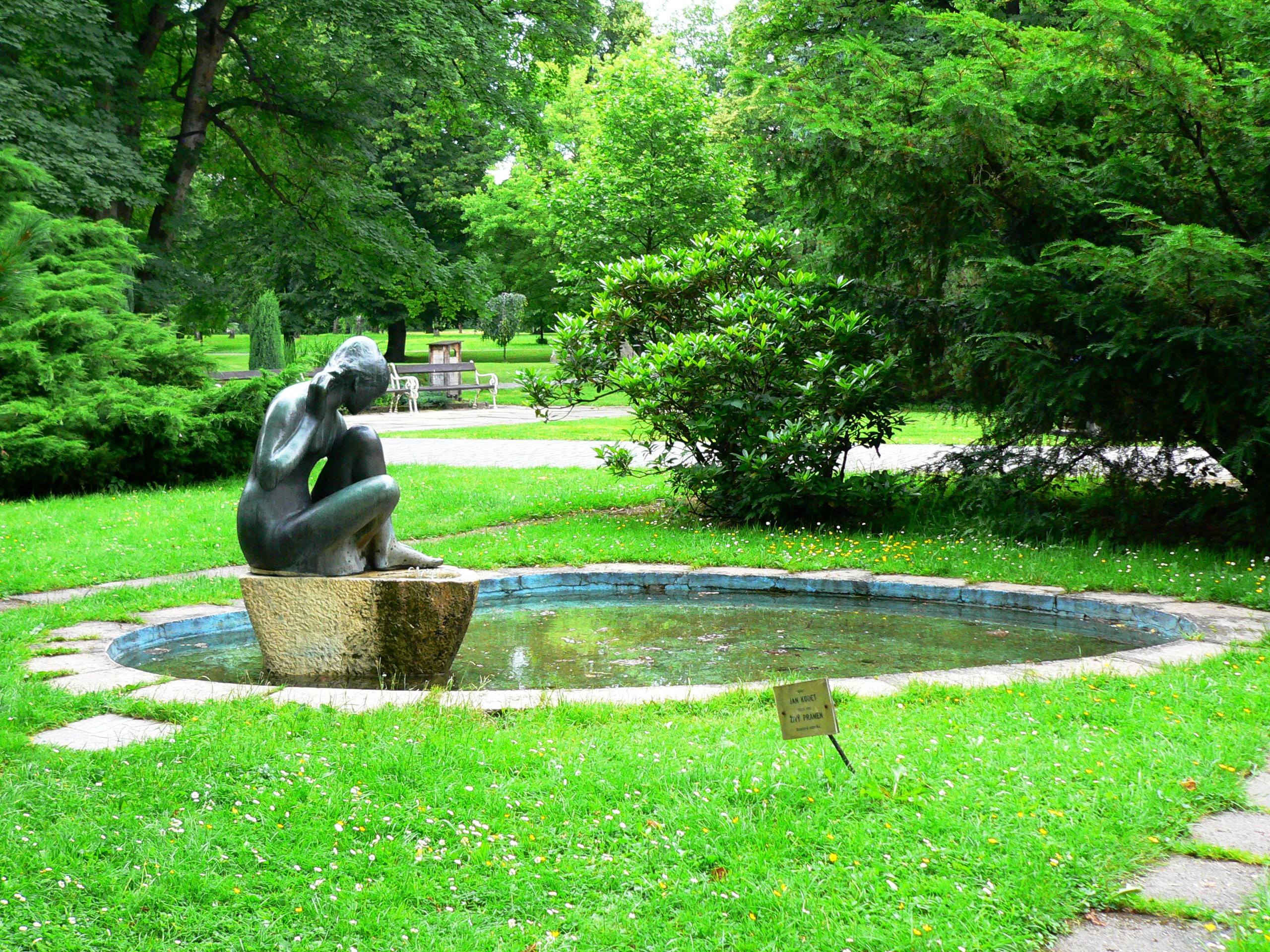 Česky: Bronzová plastika „Živý pramen“ od Jana Kodeta.